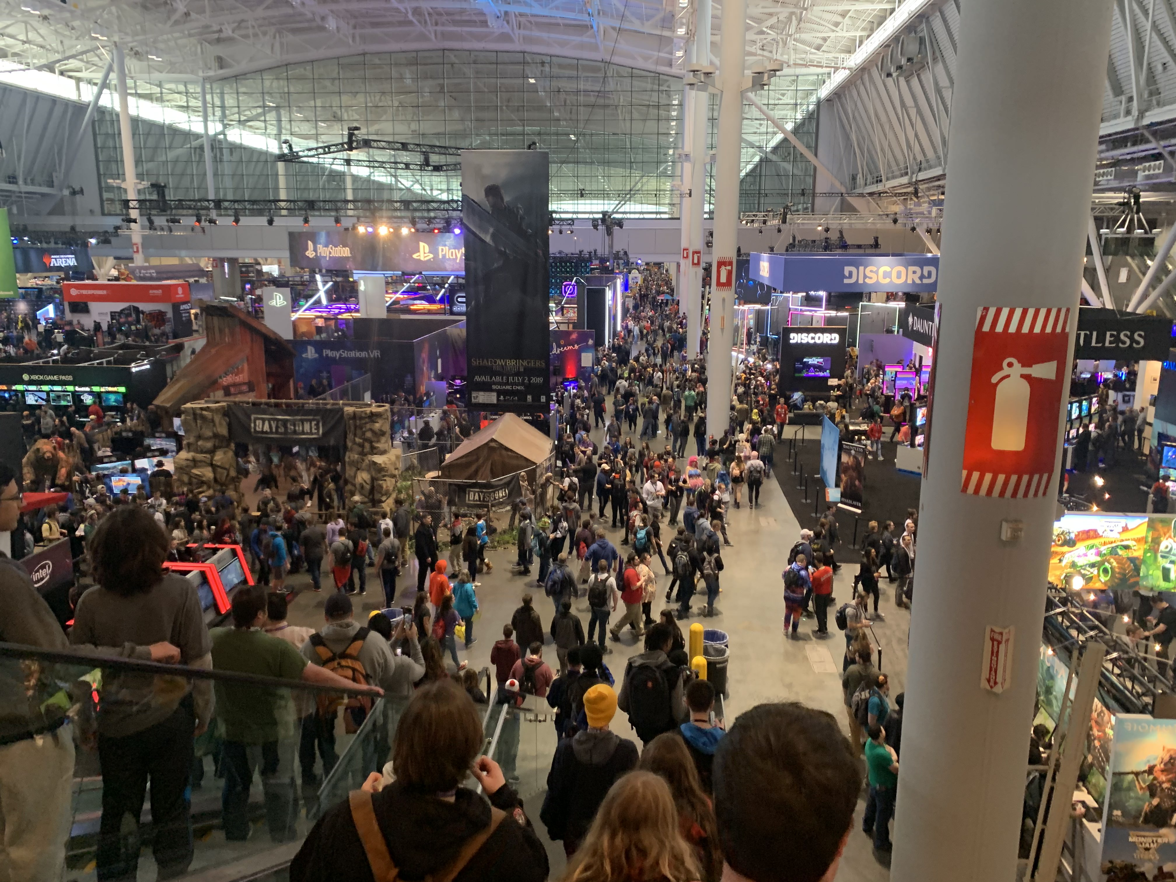 PAX EAST took placed in 2019 at BCEC